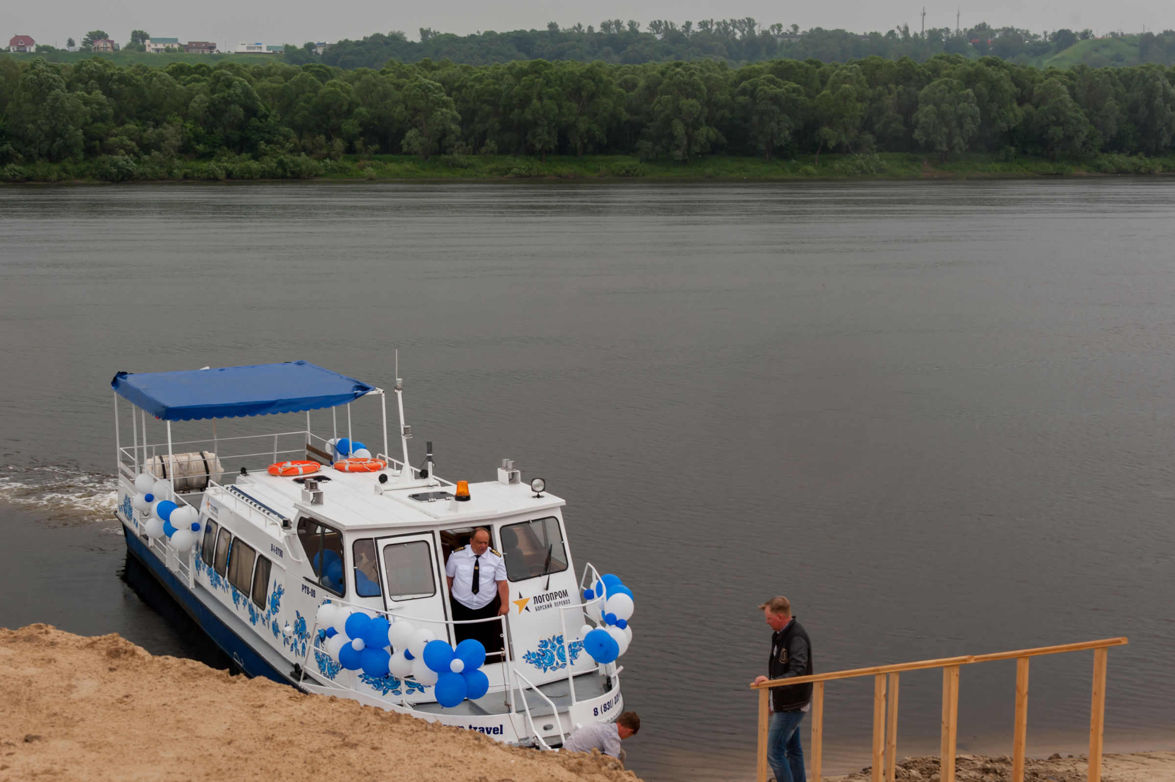 открытие маршрута Нижневолжская набережная - микрорайон Юг. 11.06.2014